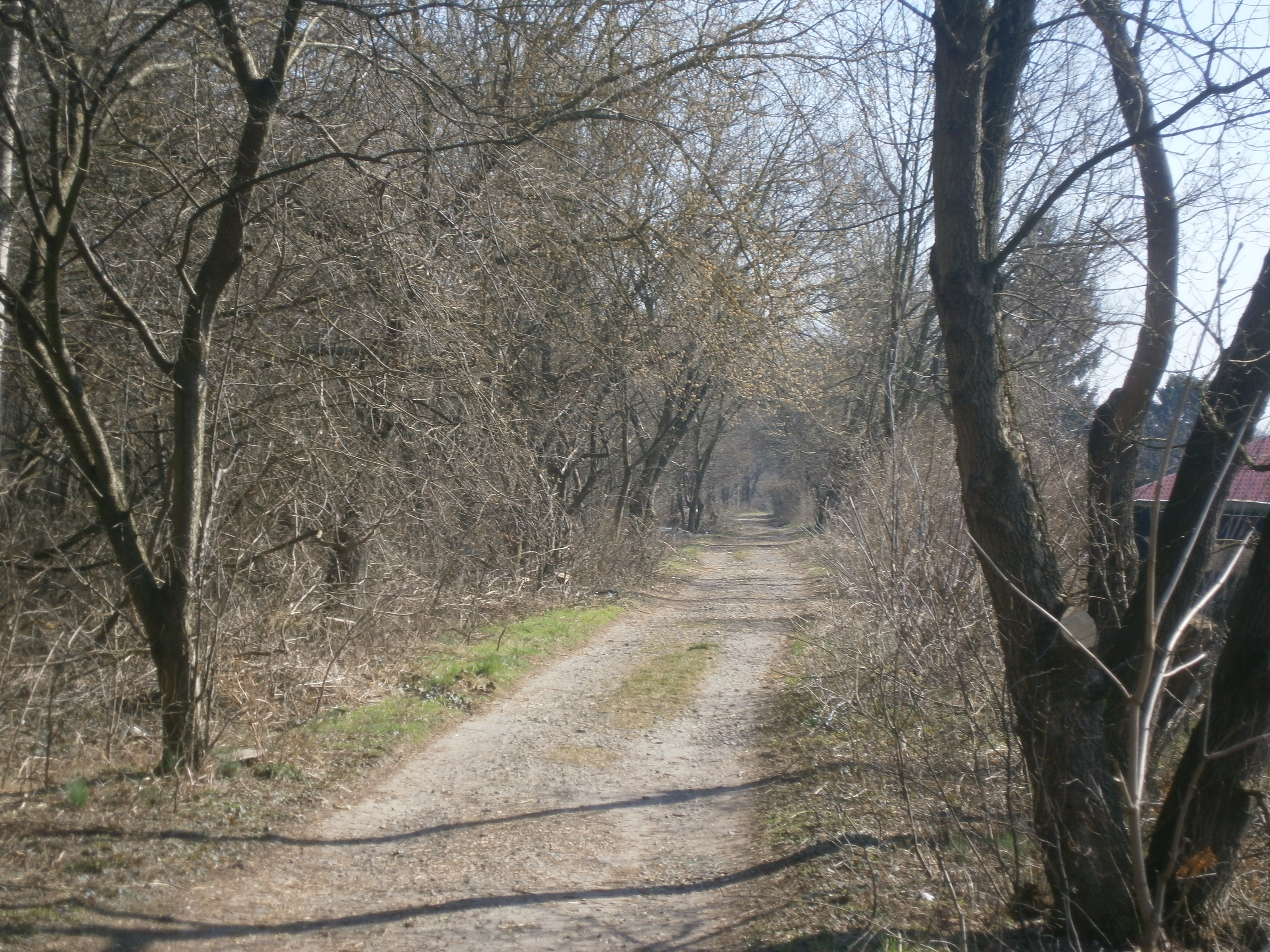 Der Lehmweg ist eine Straße in der Kleingartensiedung Nordend im Berliner Ortsteil Rosenthal (Bezirk Pankow). Gleichzeitig verläuft hier ein Abschnitt der Humboldt-Spur, der Nummer 16 der "20 grünen Hauptwege" Berlins. Am Ortsteilrand von Rosenthal zu Blankenburg verläuft der Nordgraben und der Hauptweg nutzt die Trasse der vormaligen Industrebahn Tegel-Friedrichsfelde.